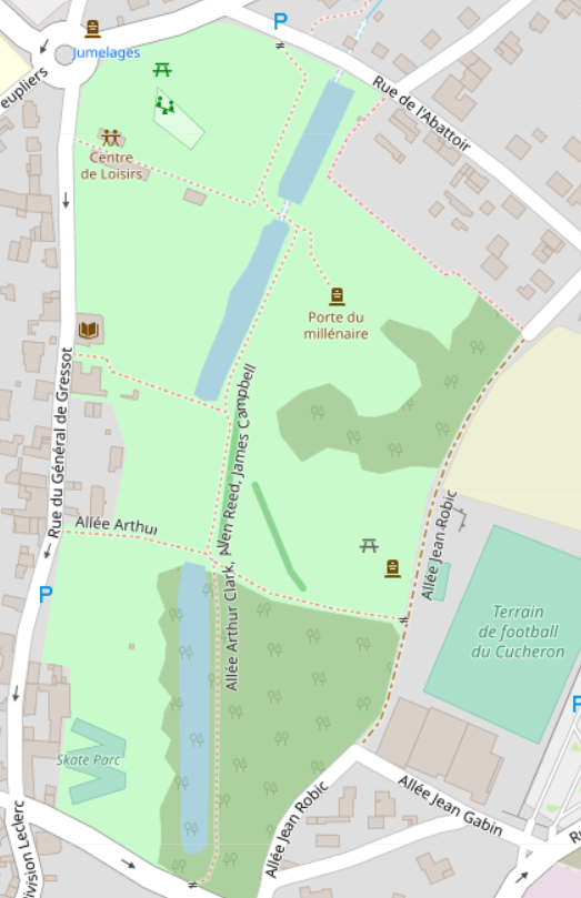 Carte OpenStreetMap (OSM) de l'Espace Arthur Clark à Wissous, France. This map may be incomplete, and may contain errors. Don't rely solely on it for navigation.